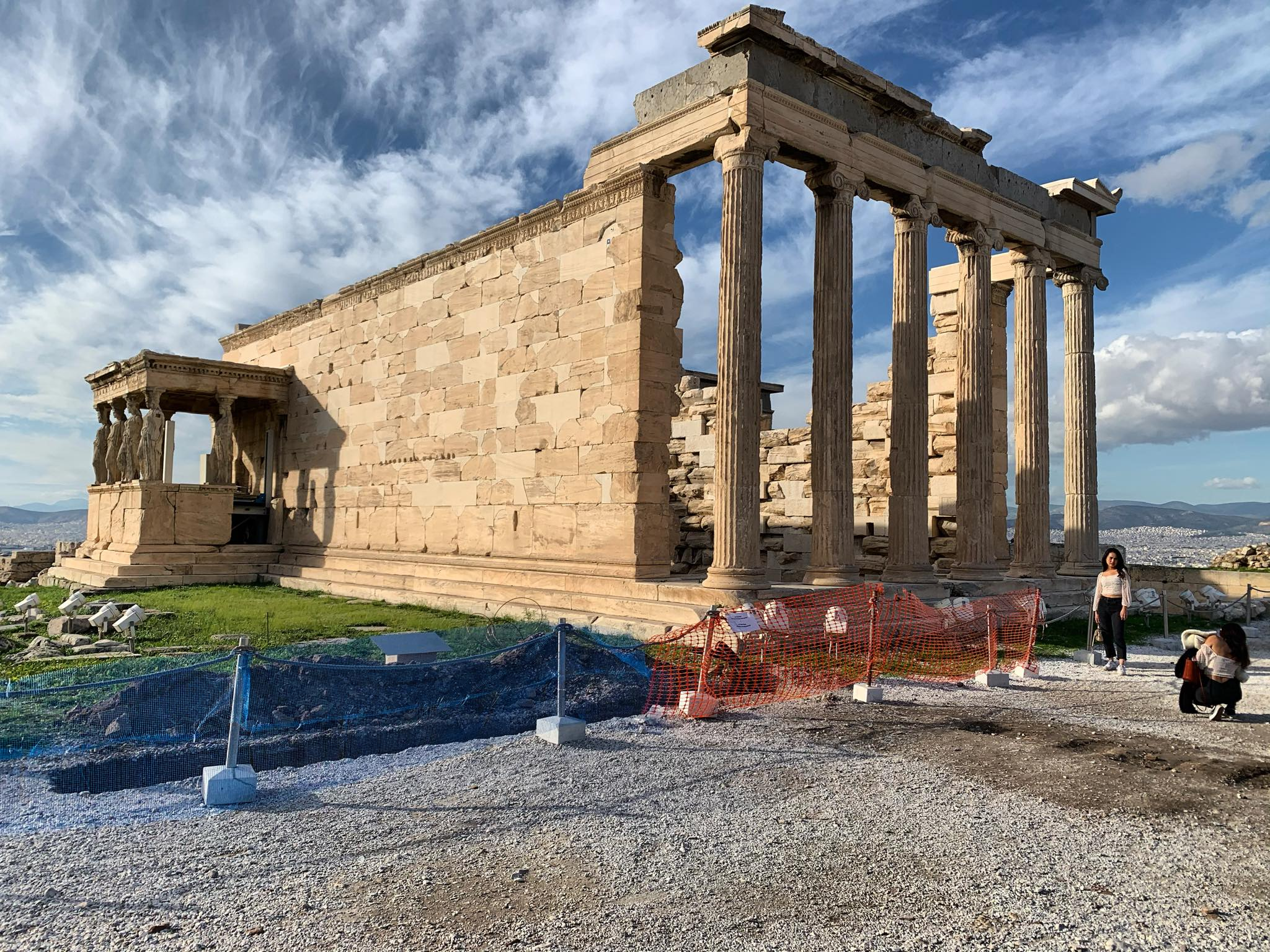 Древногръцки храм